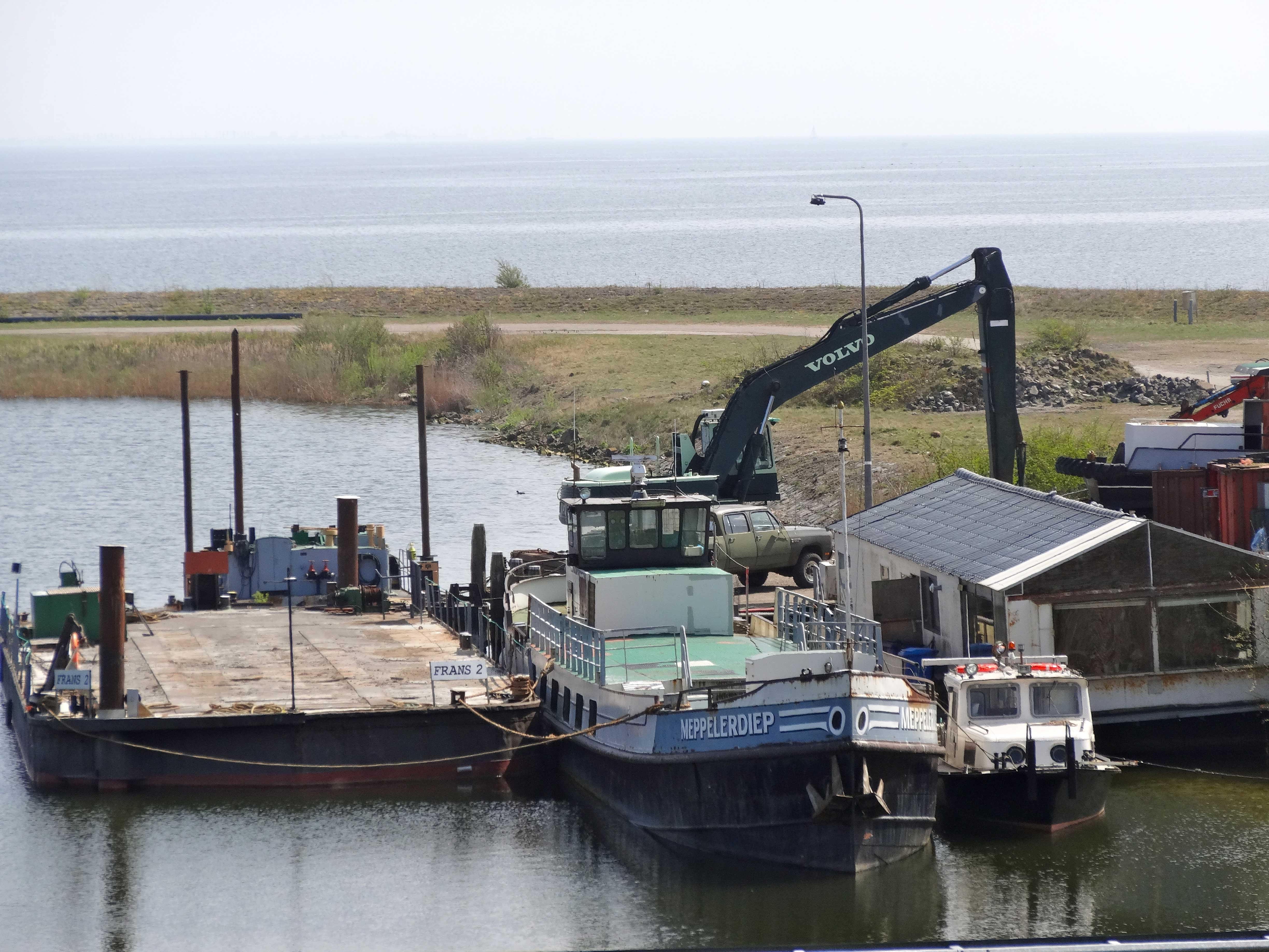 Zuiderhaven van Breezanddijk